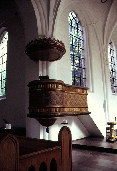 Sankt Petri Kirke i Danmark. Prædikestol